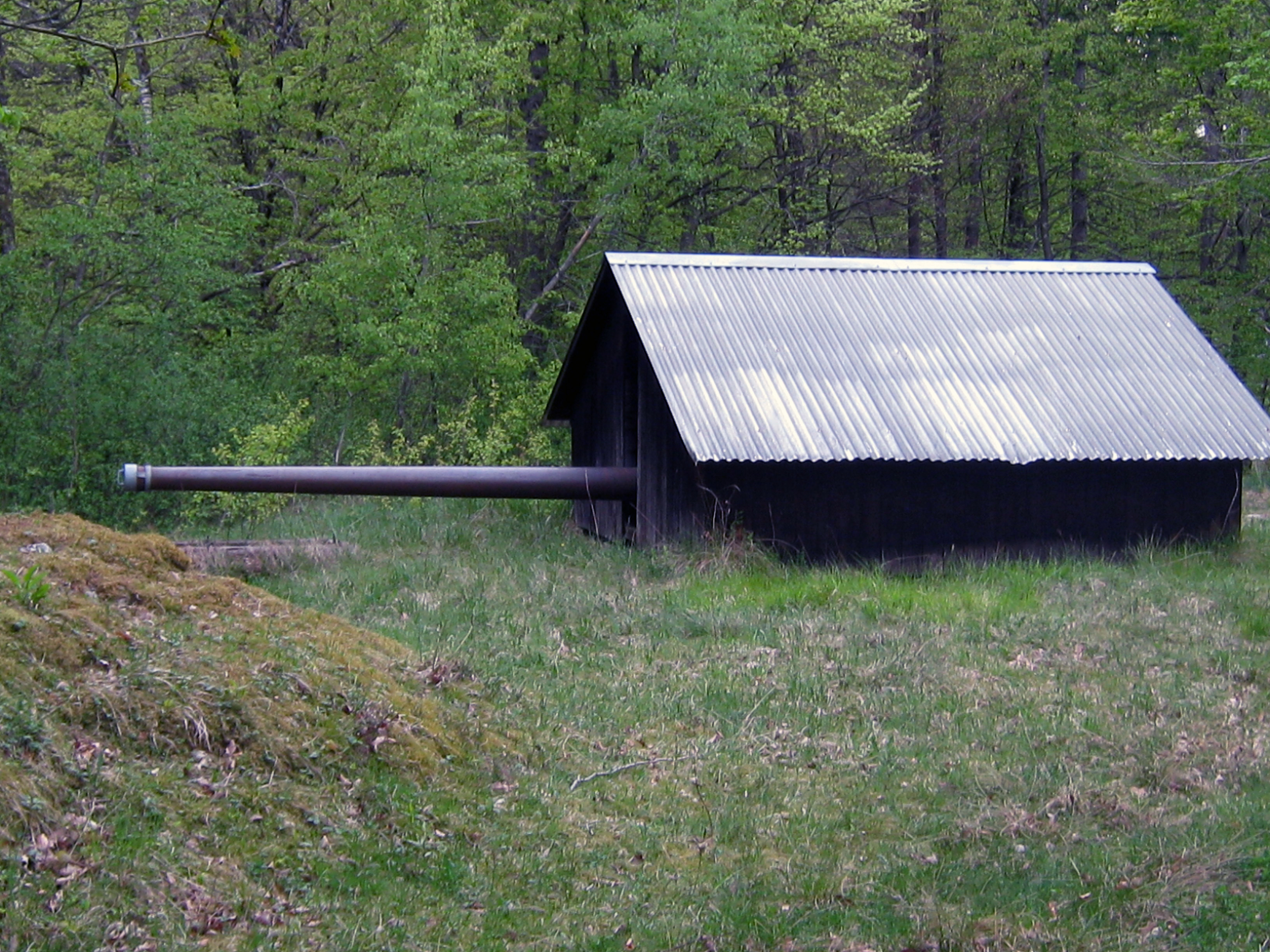 Kastels Turm 2, 47.050622 N, 9.412687 E